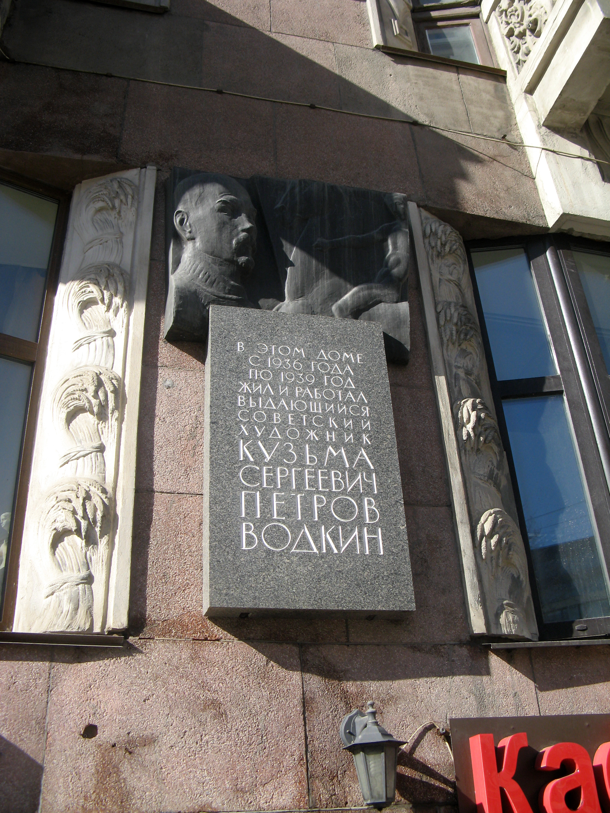 Дом работников искусств, в котором жили художники А.Ф. Пахомов (в 1935-1954 гг.), К.С. Петров-Водкин (в 1935-1939 гг.) и др.: Каменноостровский проспект, 14, Петроградский район, Санкт-Петербург